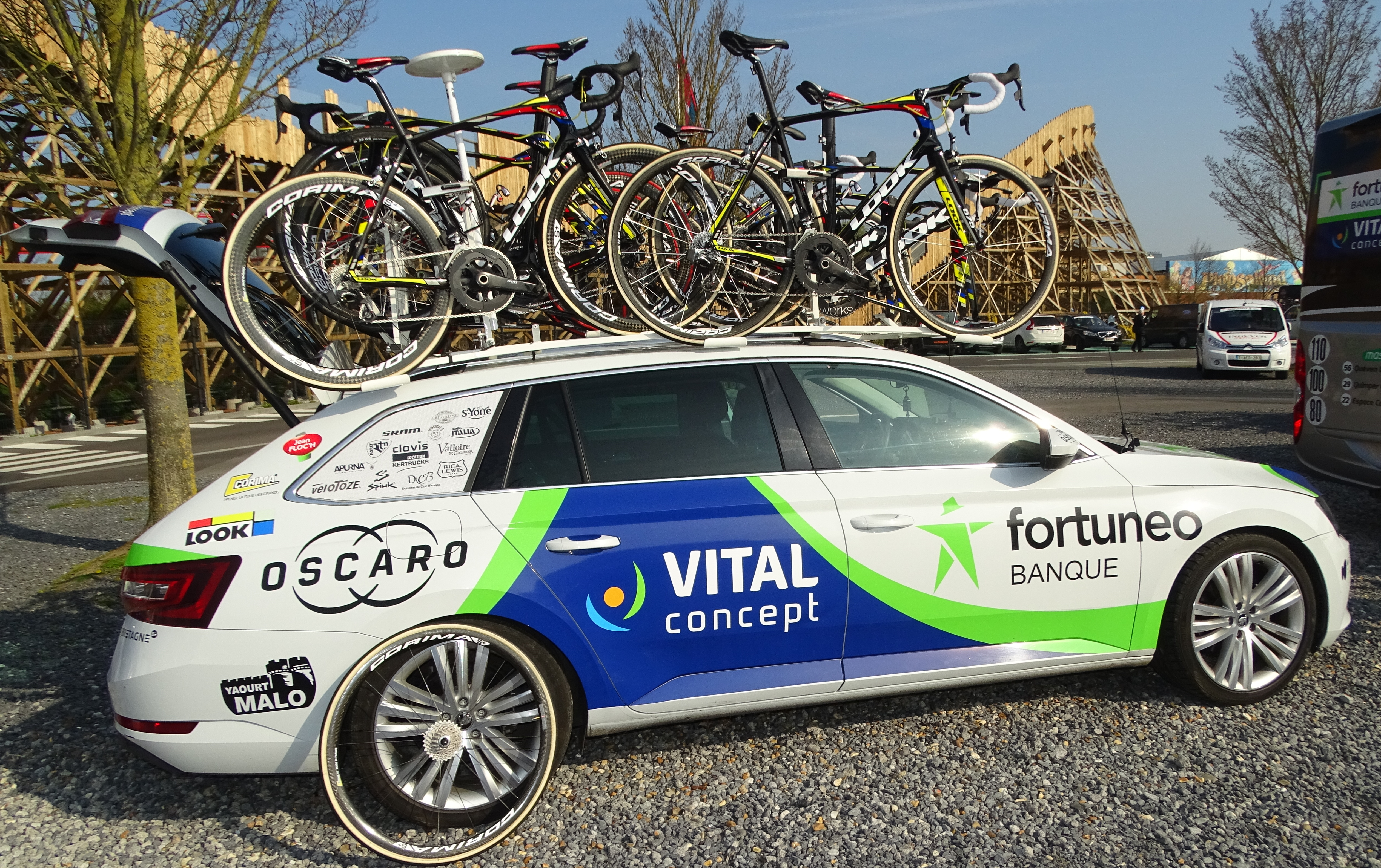 Reportage réalisé le mardi 28 mars à l'occasion de du départ de la première étape des Trois jours de La Panne 2017 à Adinkerque (La Panne), Belgique.